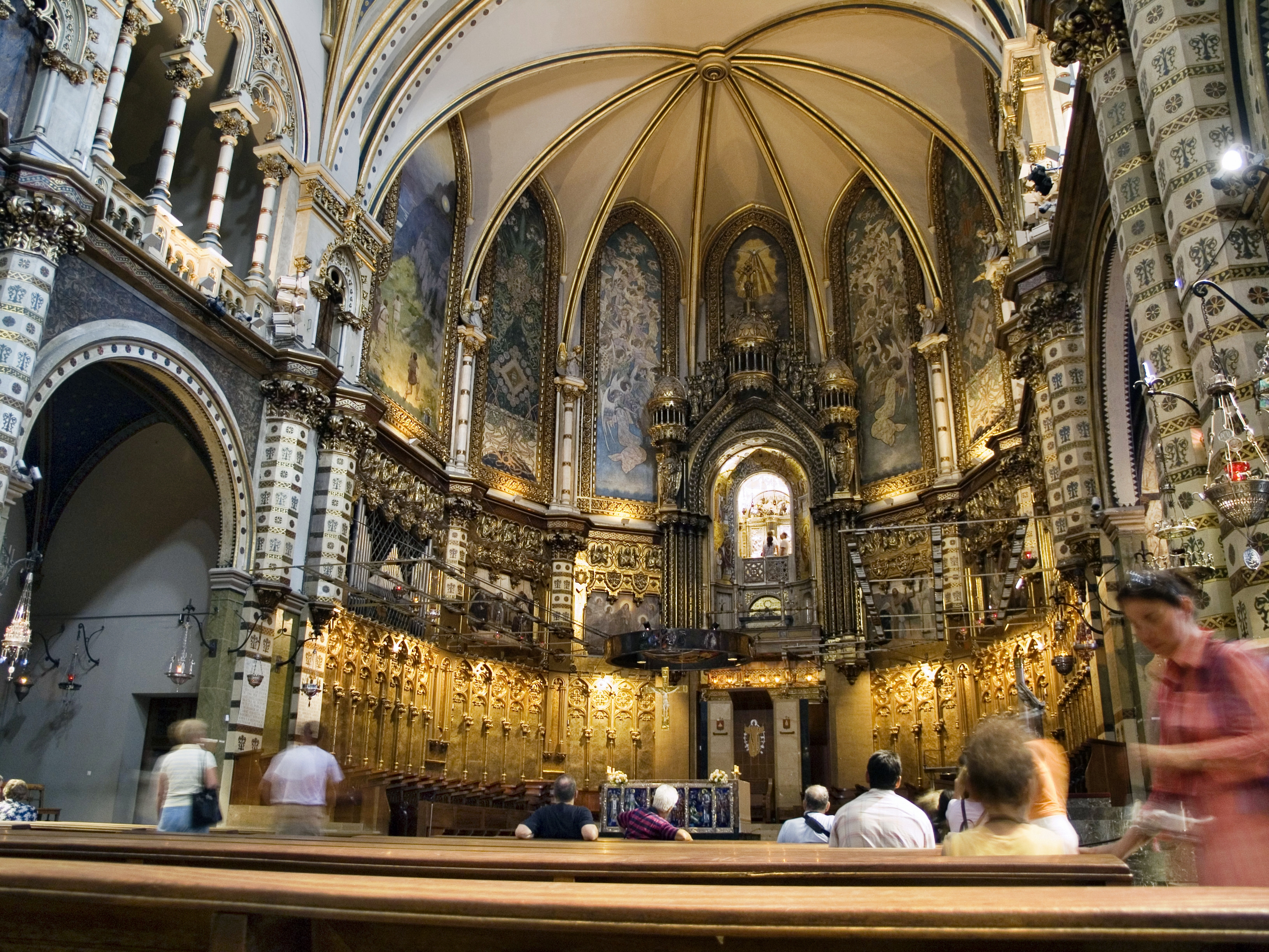 Каталония, монастырь Монсеррат – Базилика Девы Марии